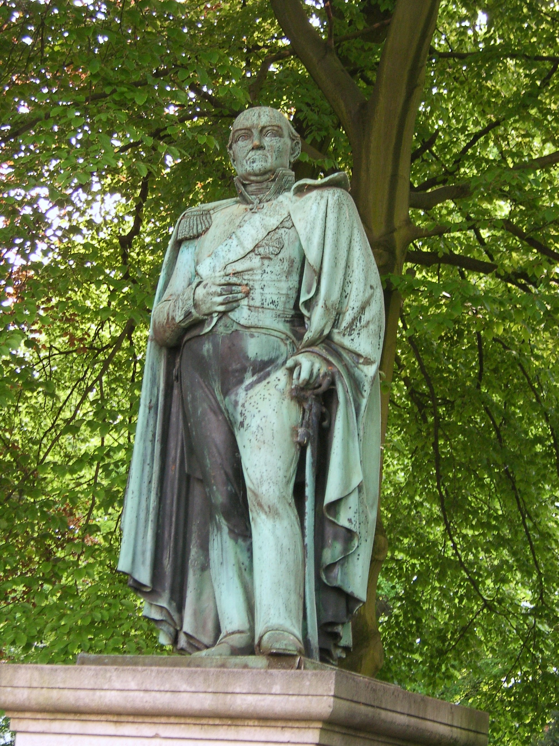 Hamburg, Altona, Rathaus, Denkmal Conrad Daniel von Blücher-Altona